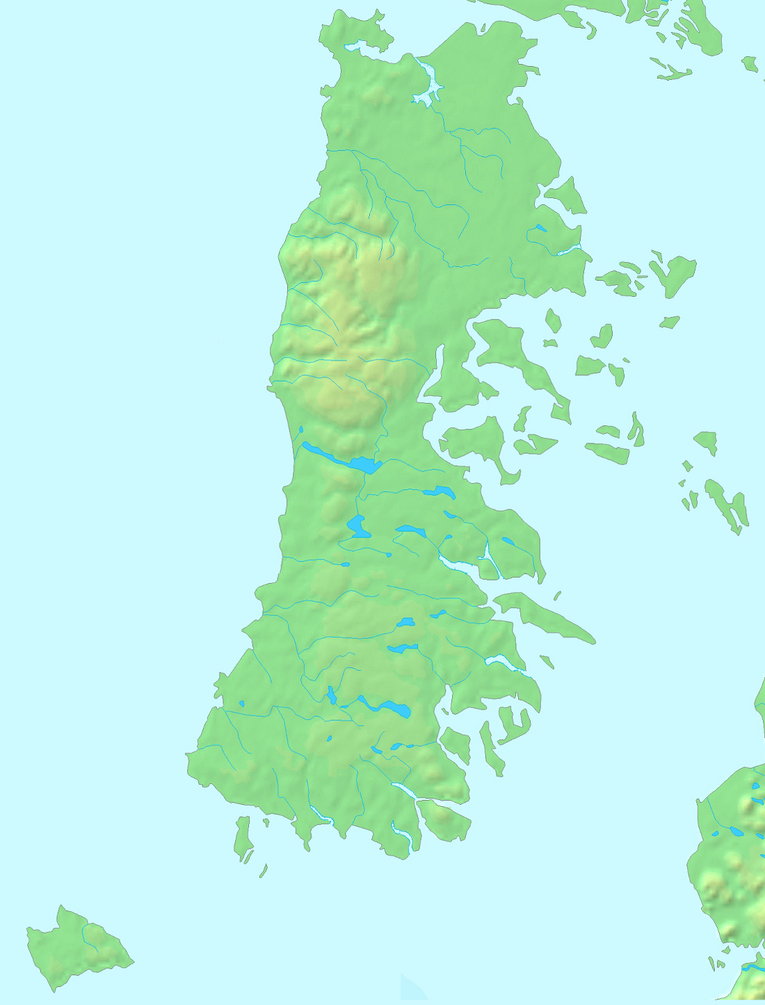 Mapa del Archipiélago de Chiloé (Chile)